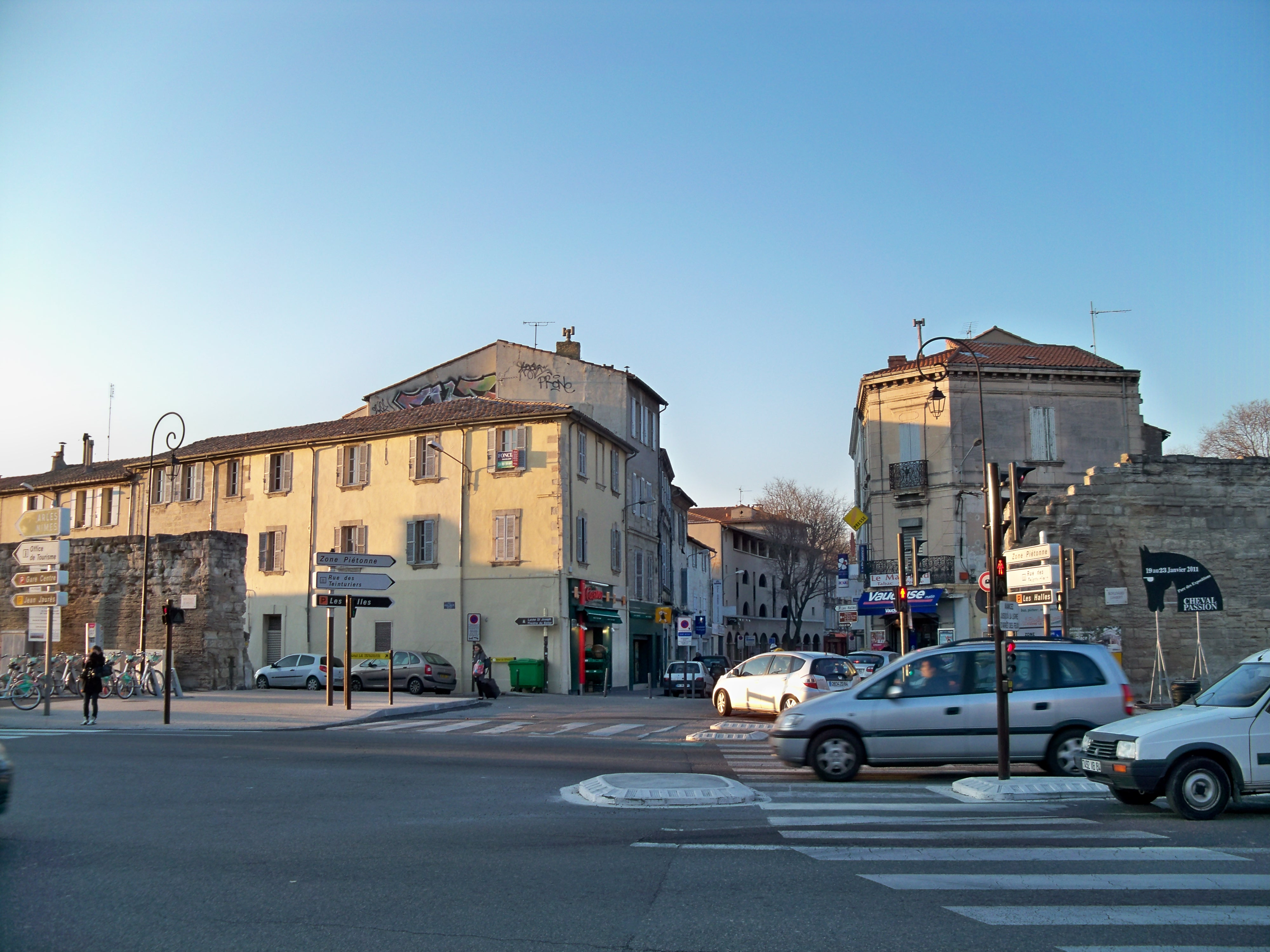 Porte Limbert des remparts d'Avignon, Vaucluse, France